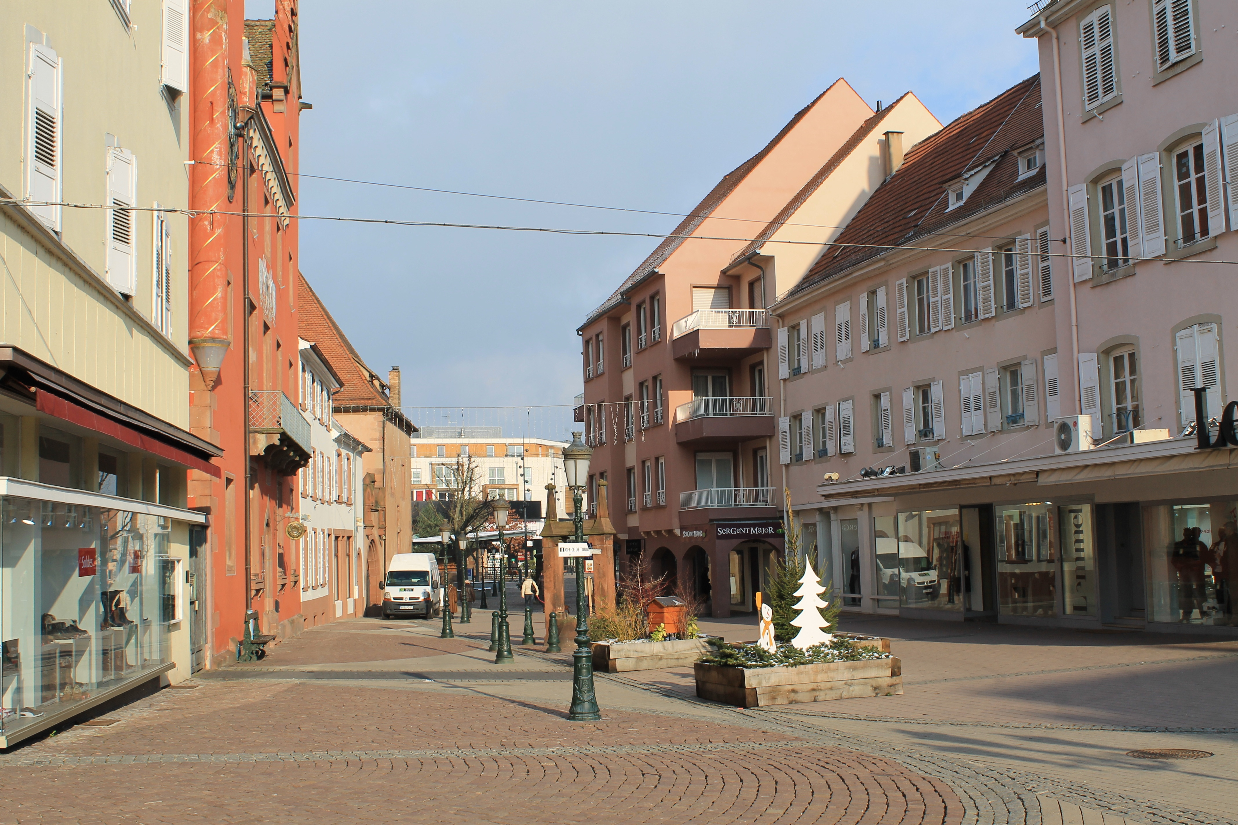 Haguenau